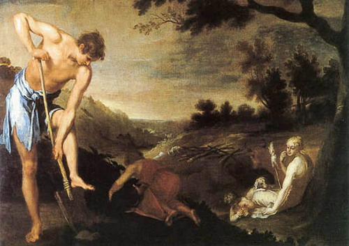 First Work of Adam and Eve by Alonso Cano.jpg